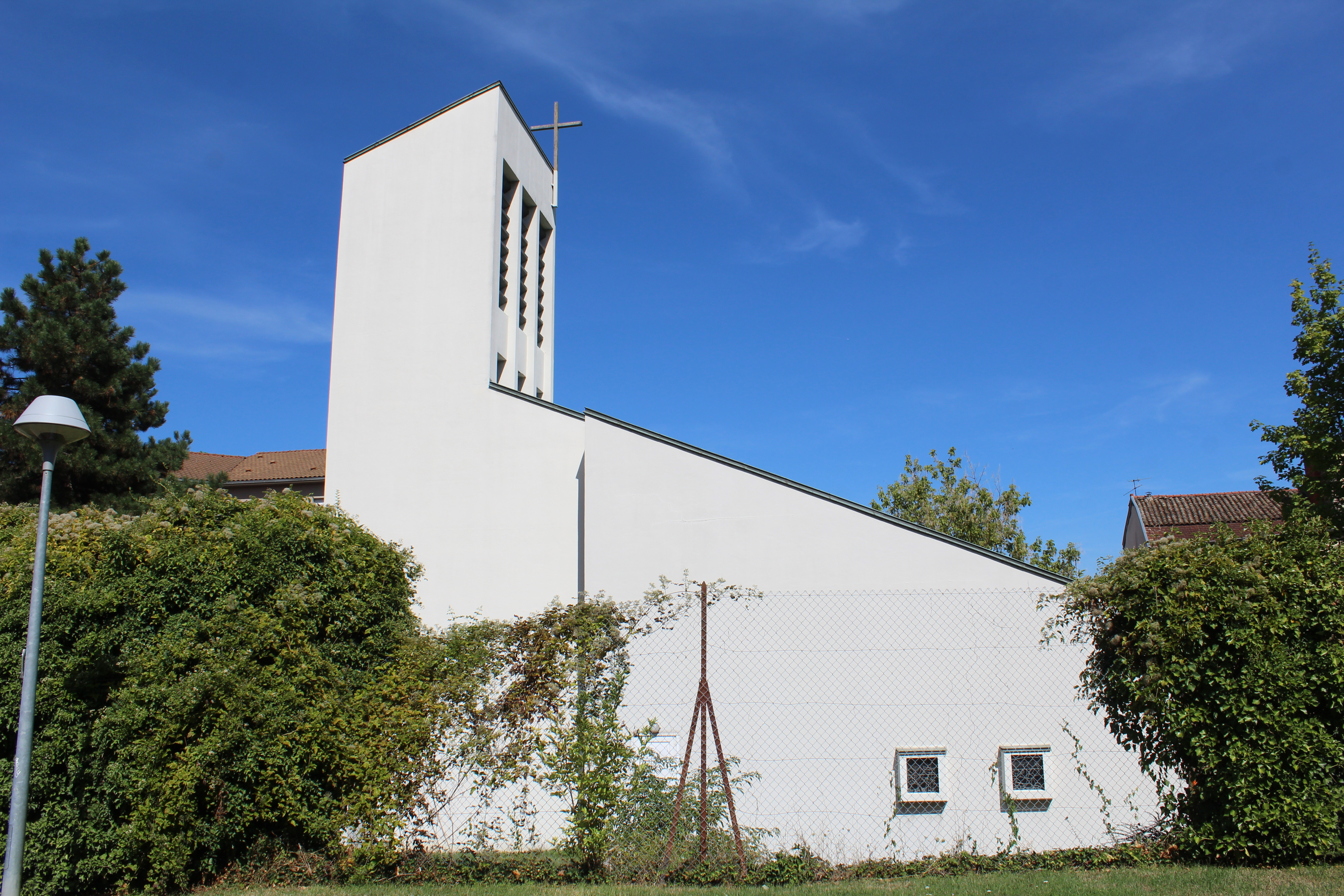 Temple protestant de Mâcon.